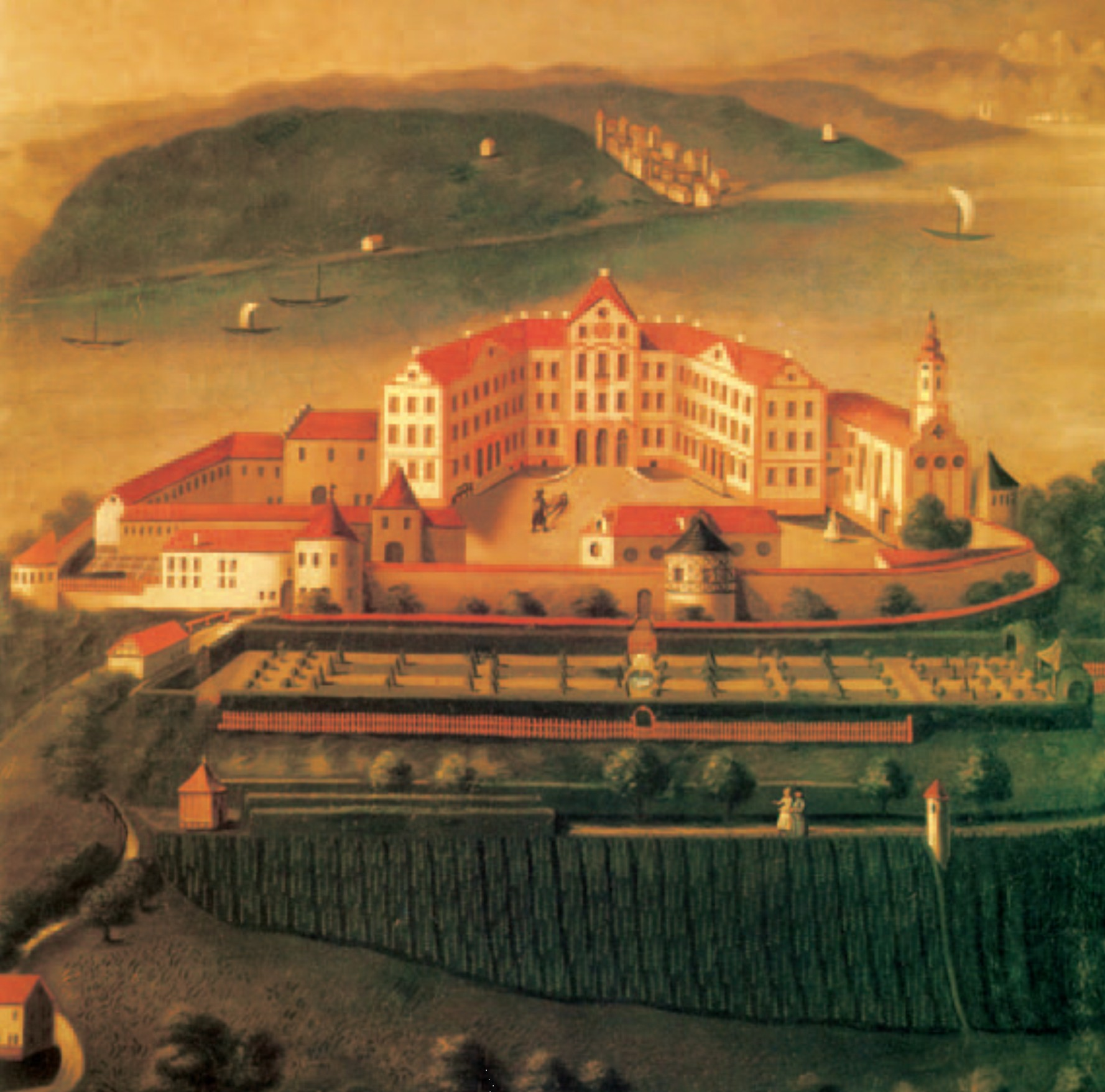 Mainau, Vogelschauansicht der Kommende um 1800. Anonymes Ölgemälde.